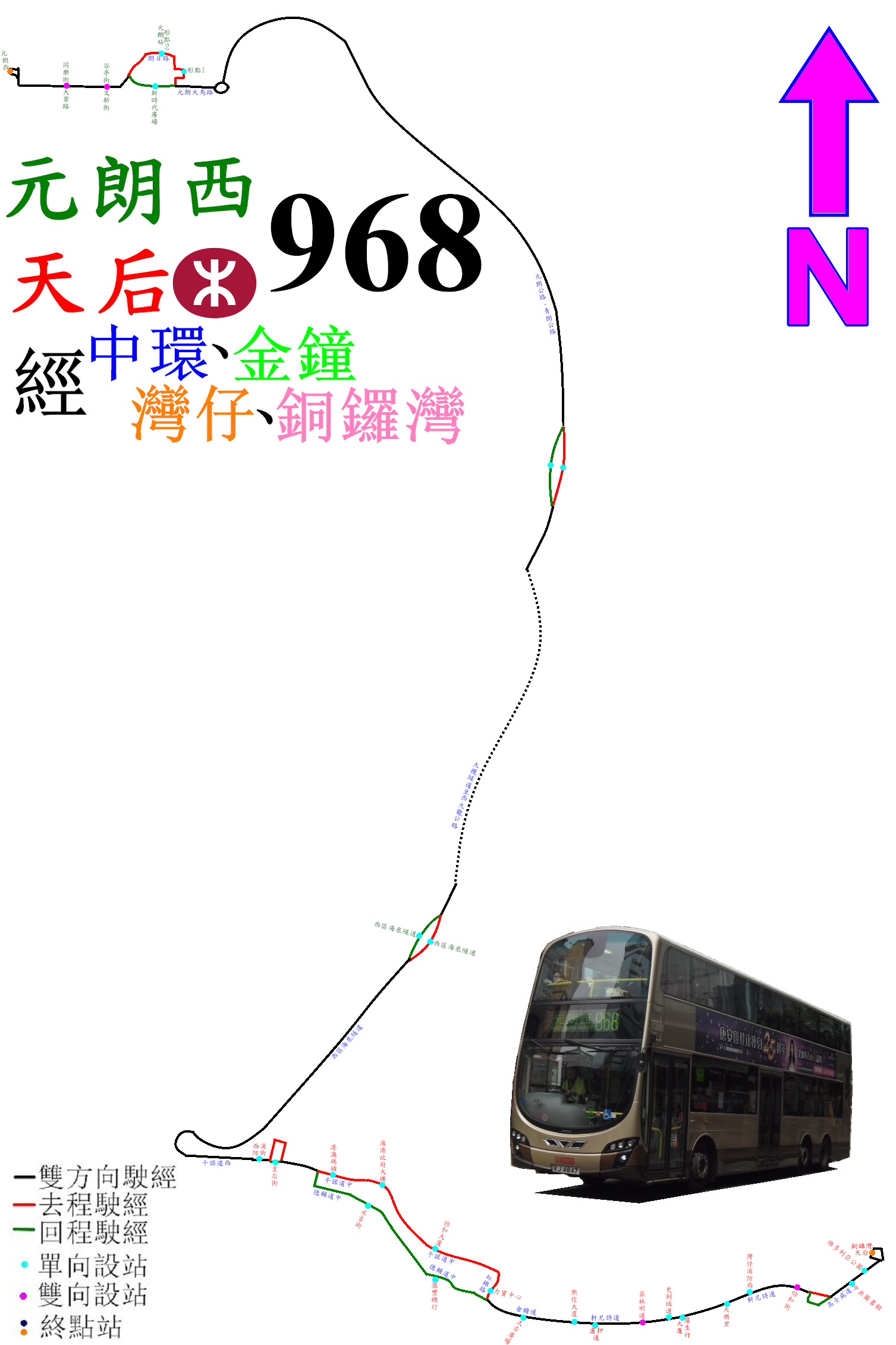 中文（香港）: 過海隧巴968線走線圖